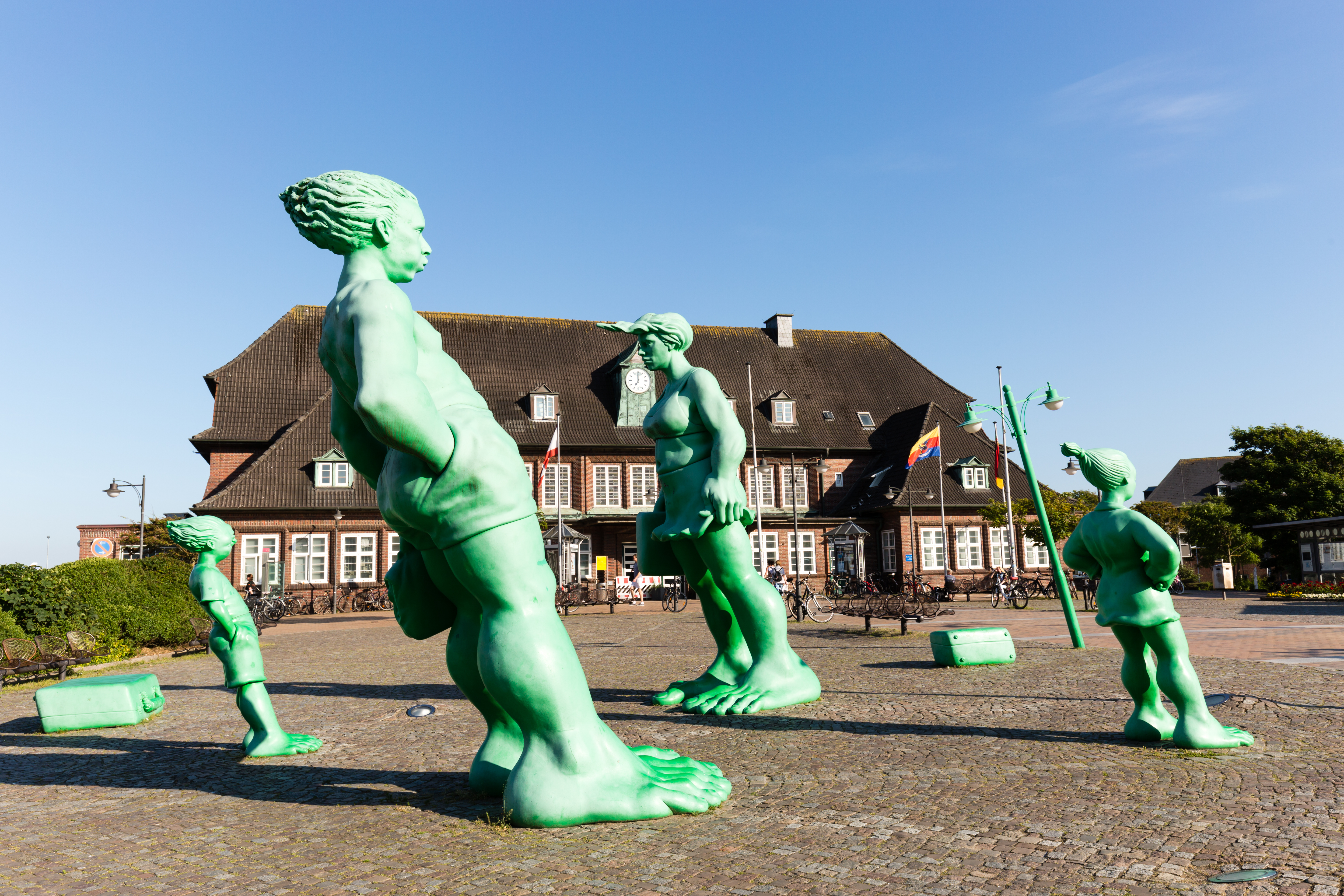 Westerländer Bahnhof auf Sylt